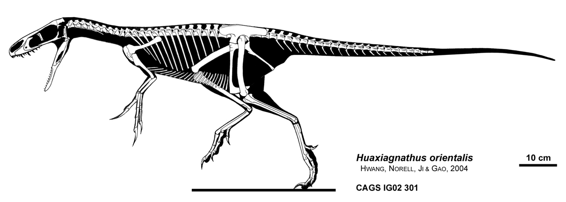 Huaxiagnathus skeletal diagram.